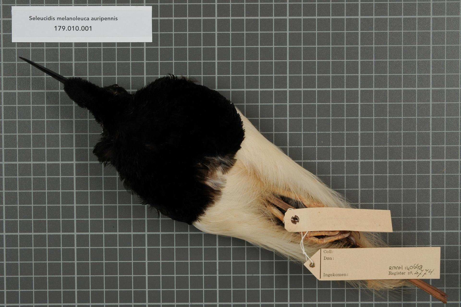 Seleucidis melanoleuca auripennis Schluter, 1911